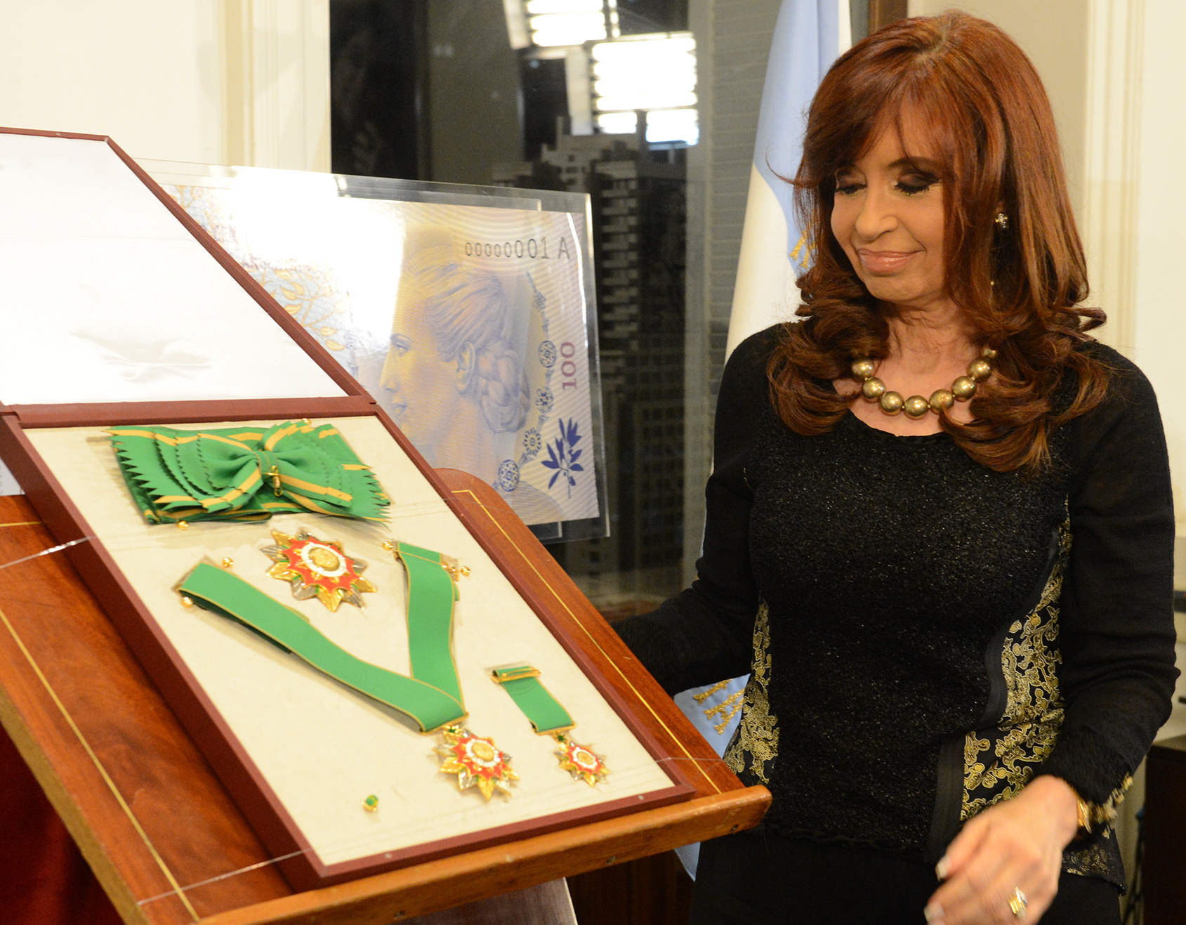 En agosto de 2015, Cristina Fernández de Kirchner recibió la Estrella de Palestina, la más alta condecoración por parte del Estado de Palestina por su apoyo a su reconocimiento como Estado y la paz con Israel.